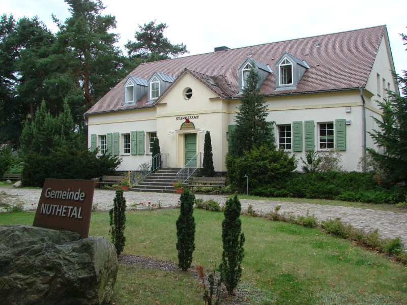 Gebäude des Standesamts an der Arthur-Scheunert-Allee